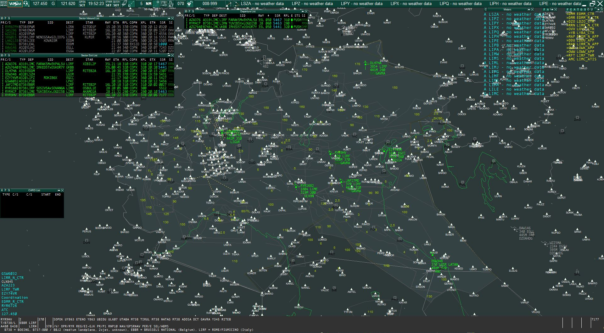 Milano Radar on VATSIM, viewed with Euroscope